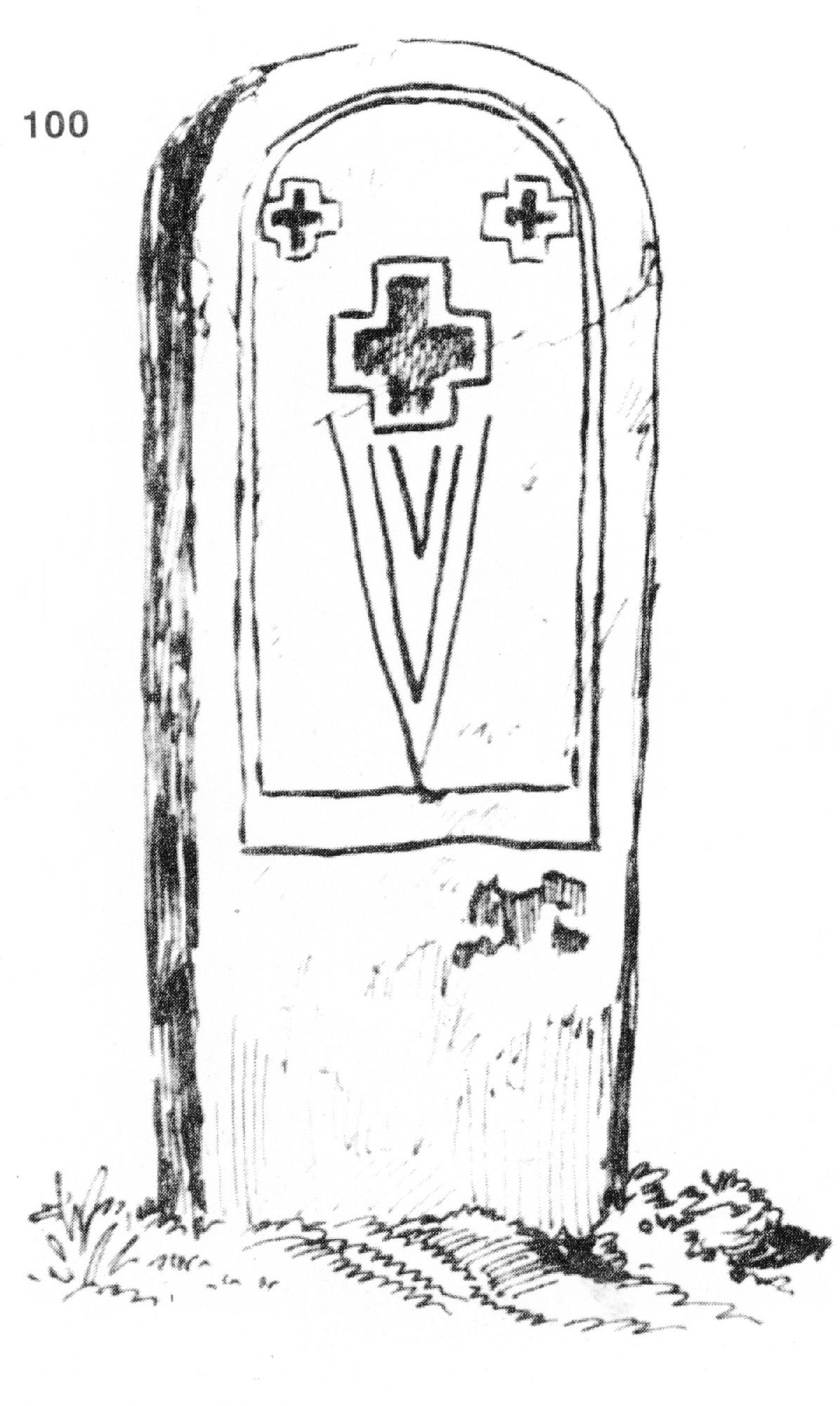 100. Надгробна плоча с кръстове от сив точилен камък из гробищата на гр. Луковит. Горният й край е заоблен - женски паметник, работен между 1870-1877 г. Размери: 108x47x9 см. Скицирана на 19.IX.1929г. (Т. 13, обр. 74.)